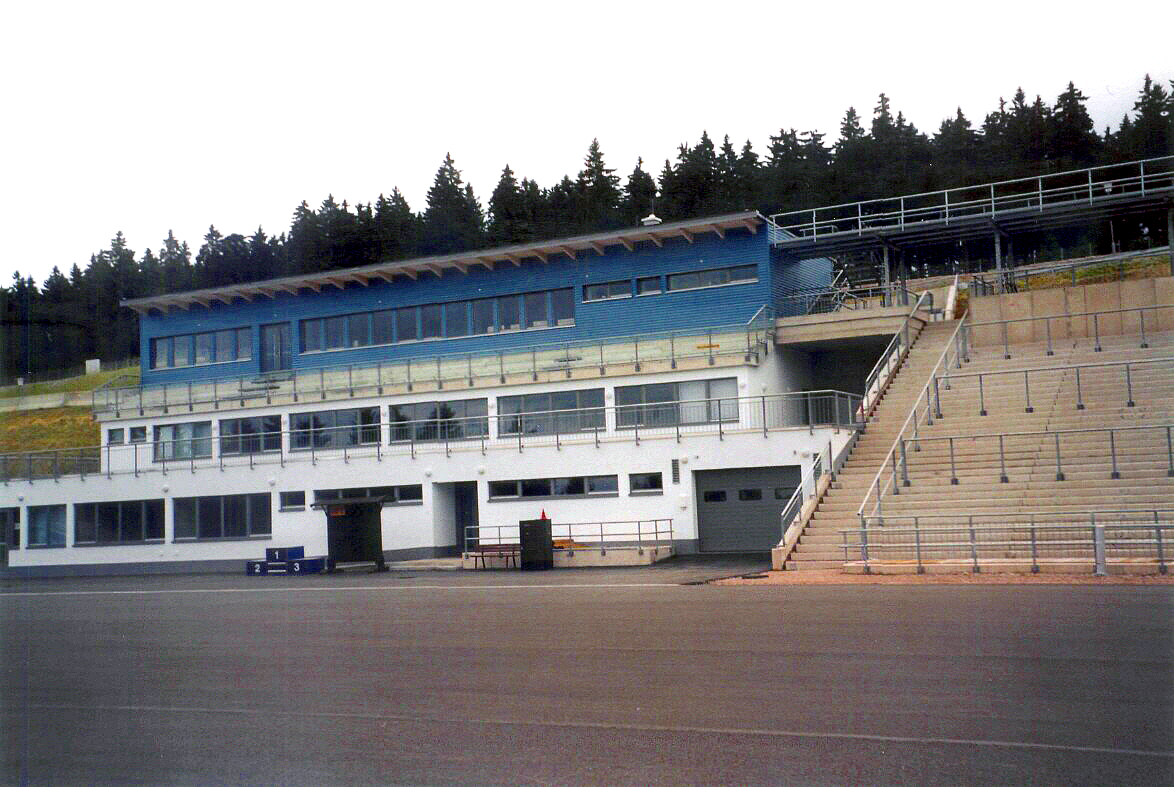 Oberhof, Rennsteig-Arena